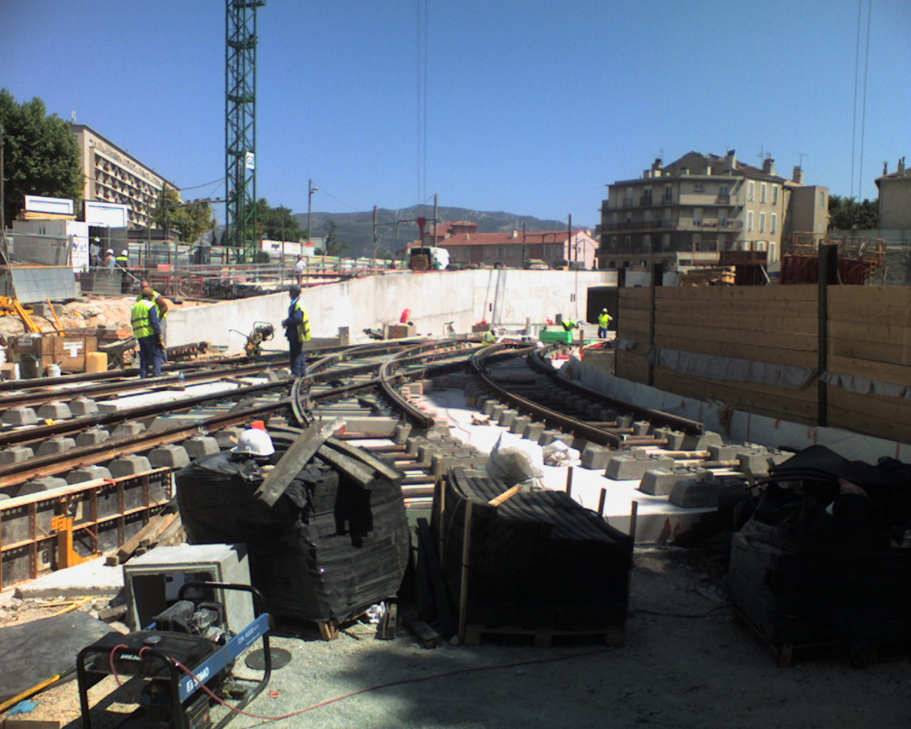 En juin 2006 Chantier du tramway de Marseille (La Blancarde) devant la gare de Marseille Blancarde.